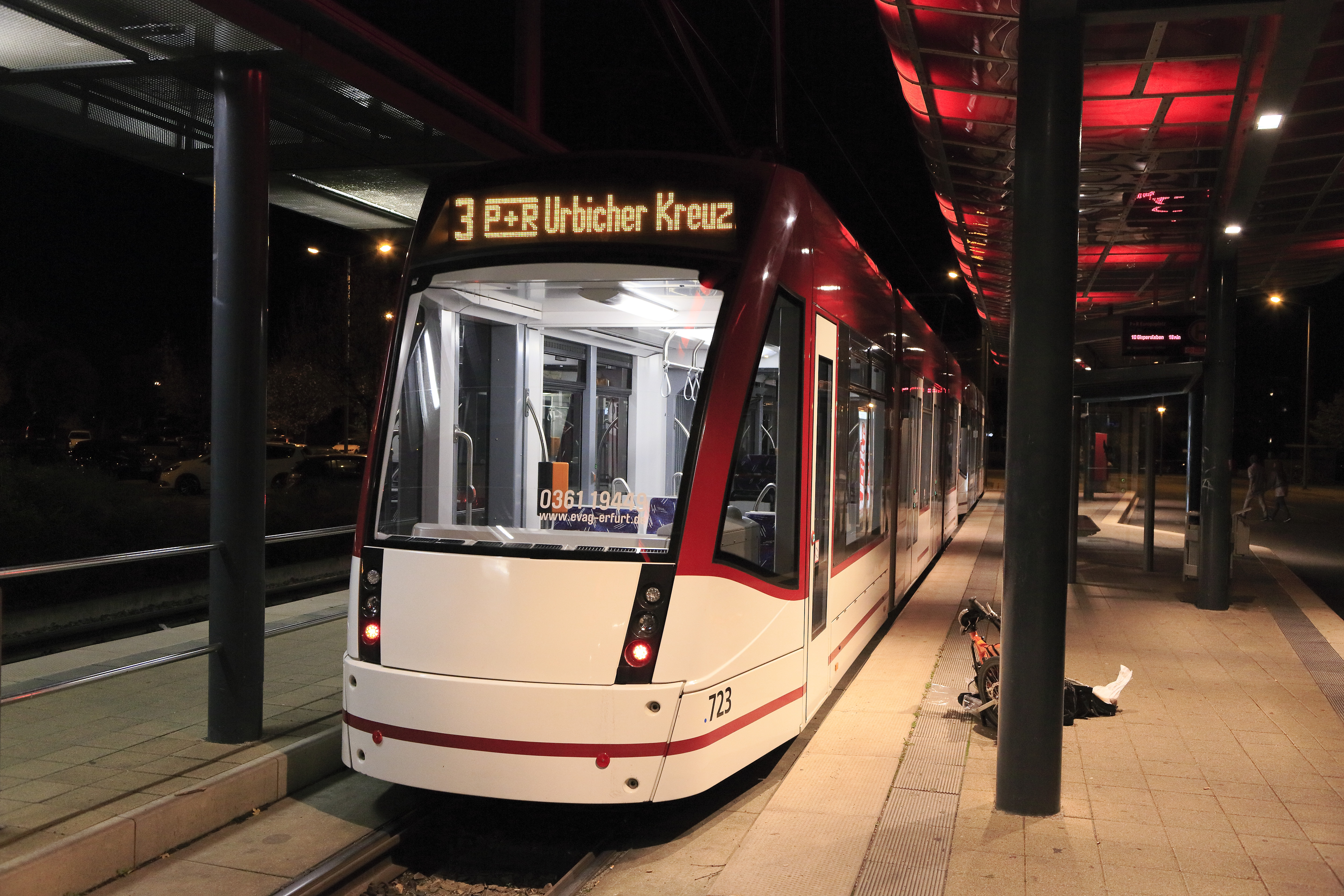 Combino classic, Zug aus zwei dreiteiligen Einheiten (B-Ende)